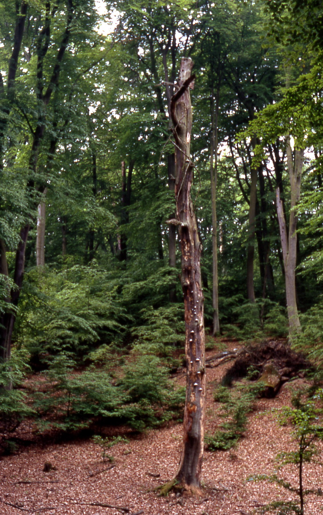 Urwaldartiger Rotbuchenwald mit Totholz im Müritz-Nationalpark, separater Gebietsteil "Serrahn".